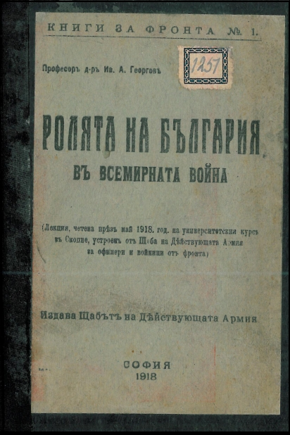 Корица на „Ролята на България във всемирната война“.